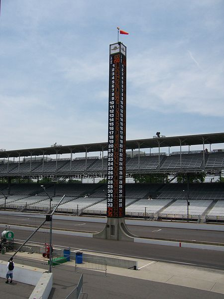 Indy500 pilon